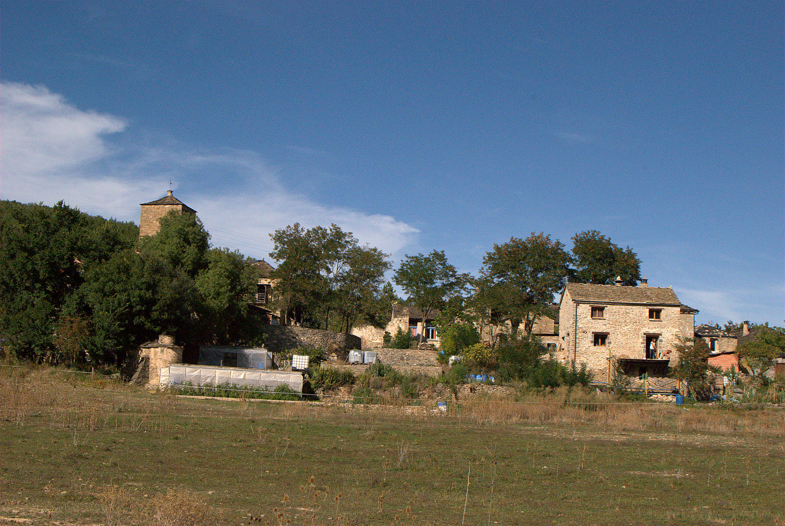 Ibort, provincia de Huesca, Aragón, España.